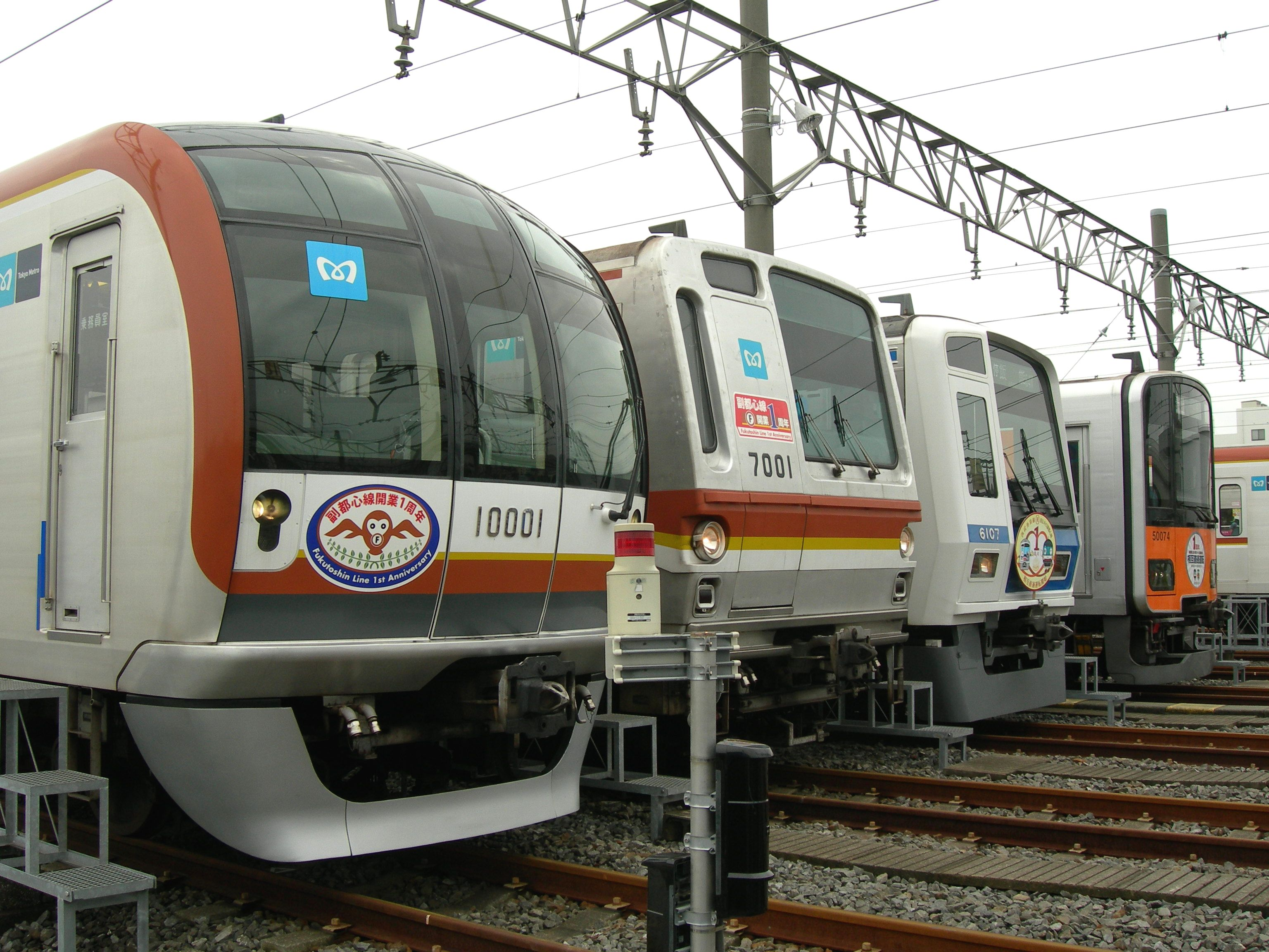 副都心線開通一周年記念イベントでの撮影用車両の並び 新木場検車区で撮影